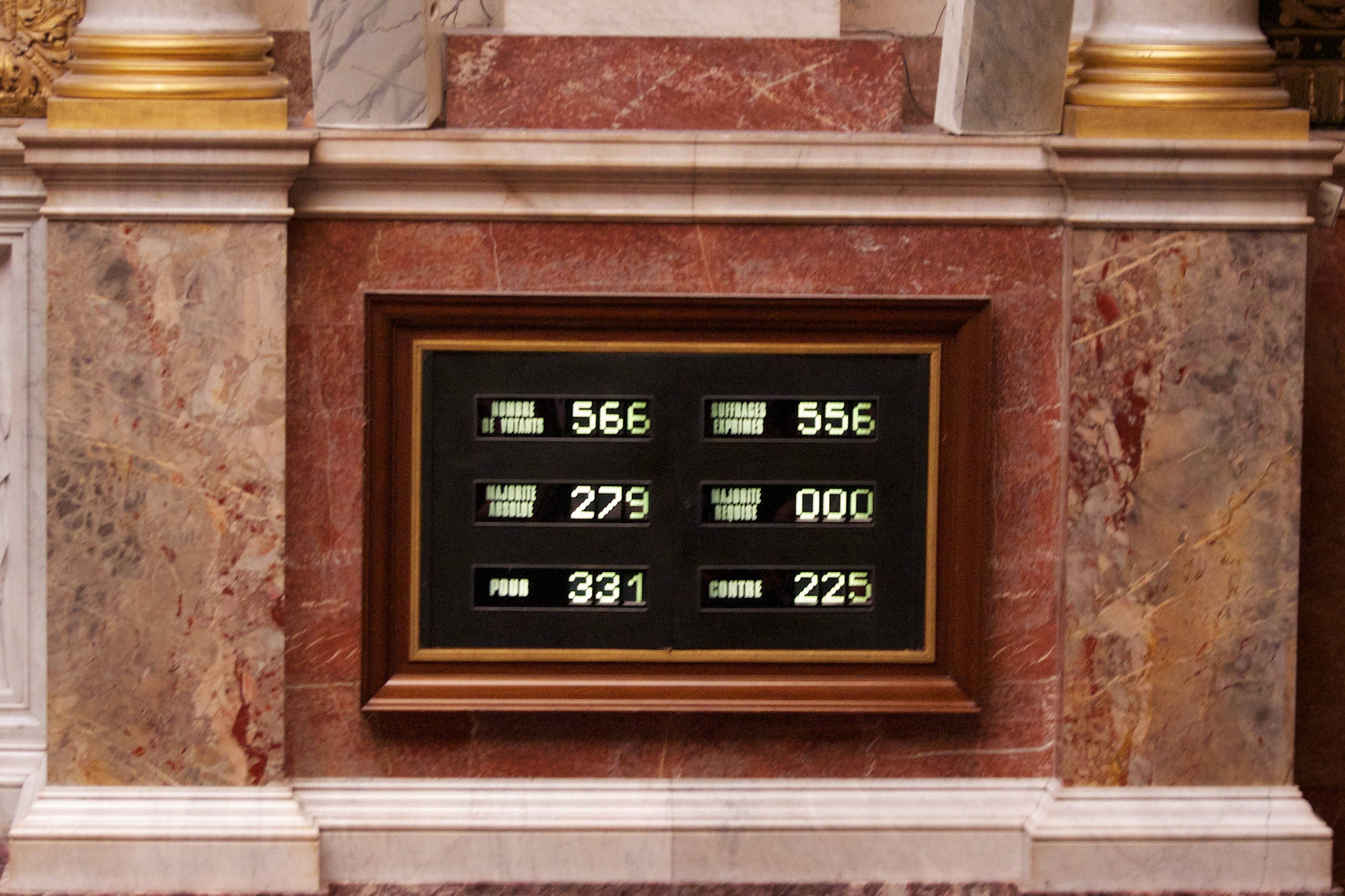 Vote solennel de la loi ouvrant le mariage aux couples de personnes de même sexe - Assemblée nationale